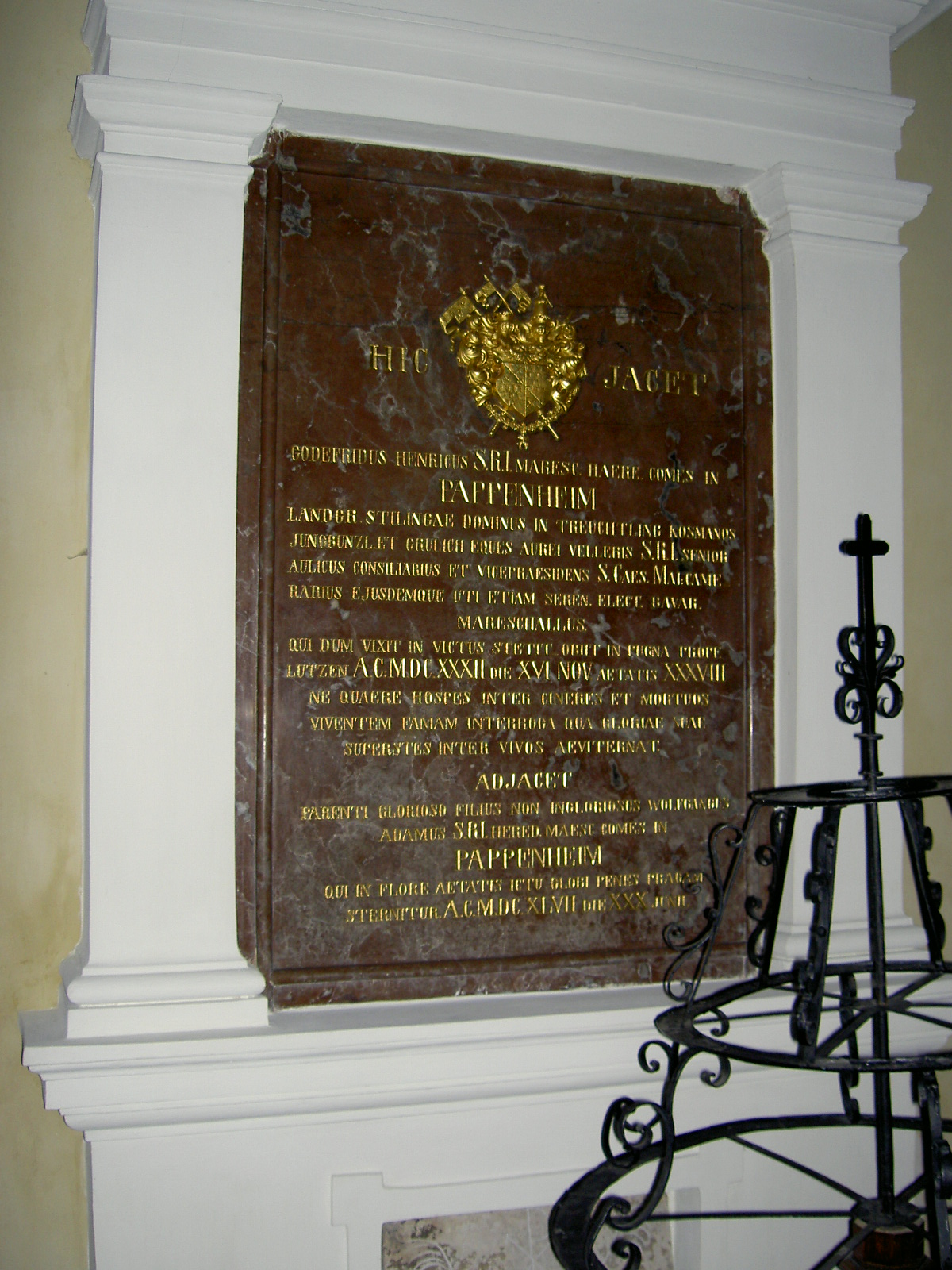 Die Grablege Gottfried Heinrich Graf zu Pappenheim im Kloster Strahov in Prag